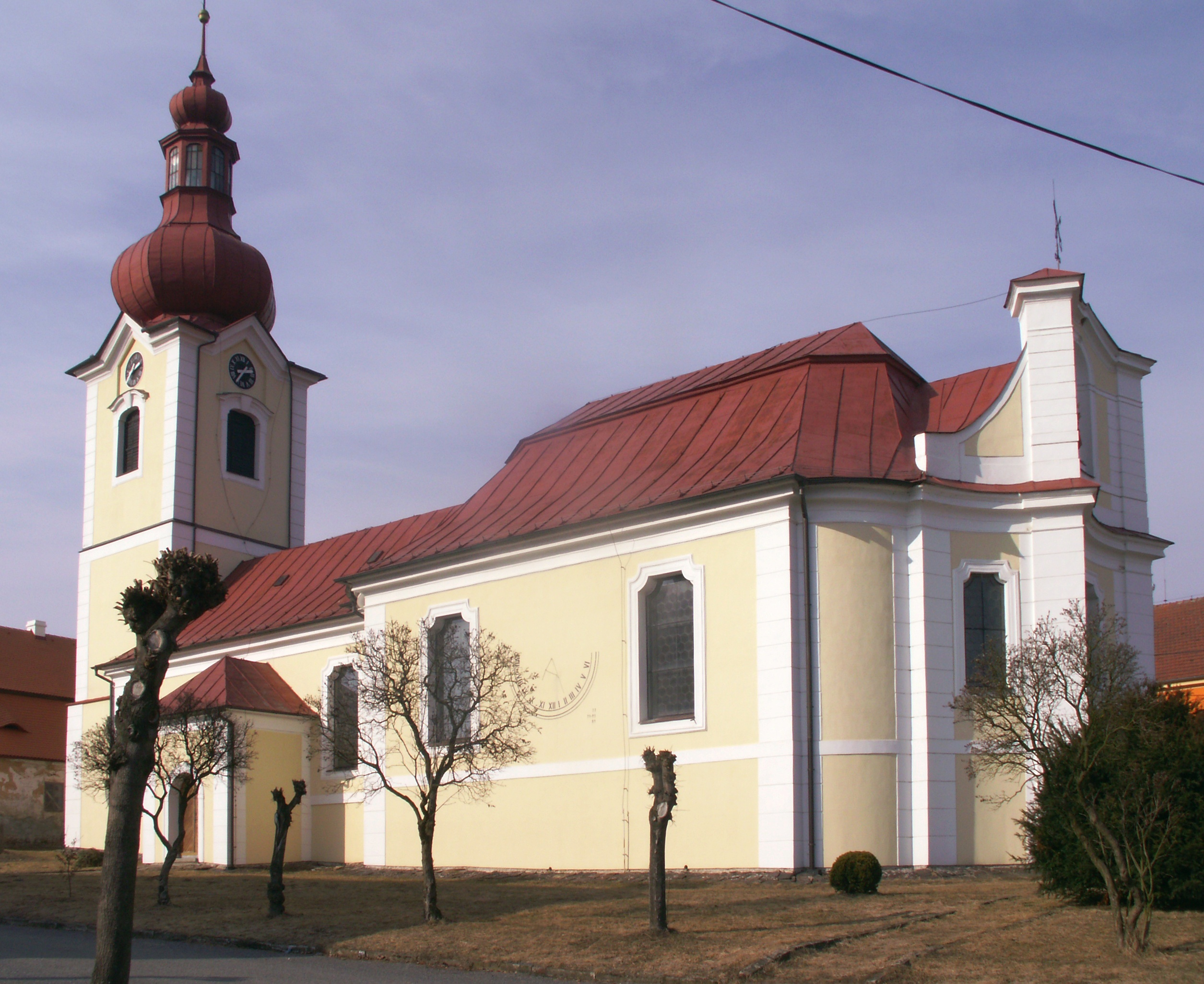 kostel sv. Petra a Pavla, projekt Santini, Horní Bobrová, okres Žďár nad Sázavou, kraj Vysočina